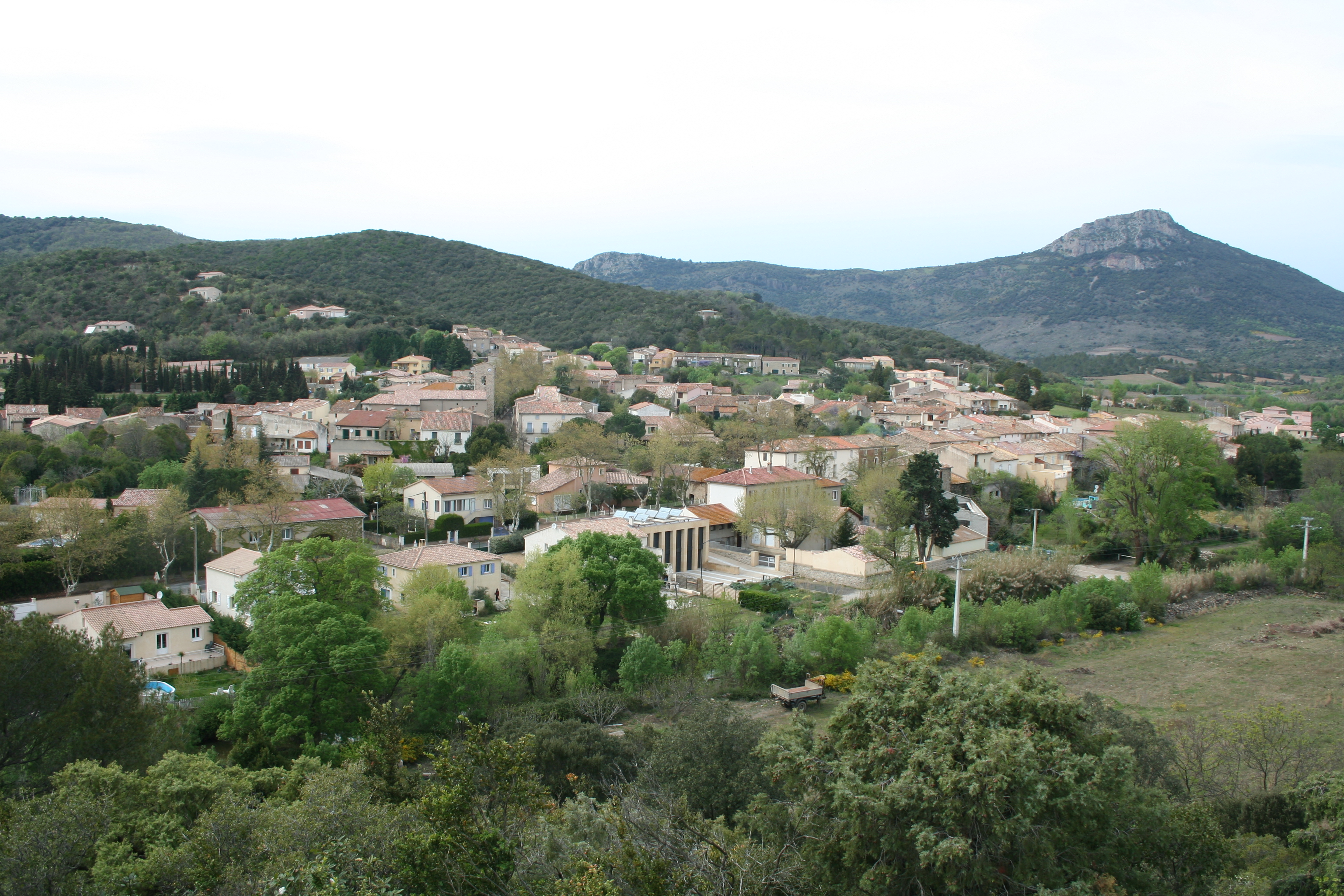 Cabrières (Hérault) - Vue générale.